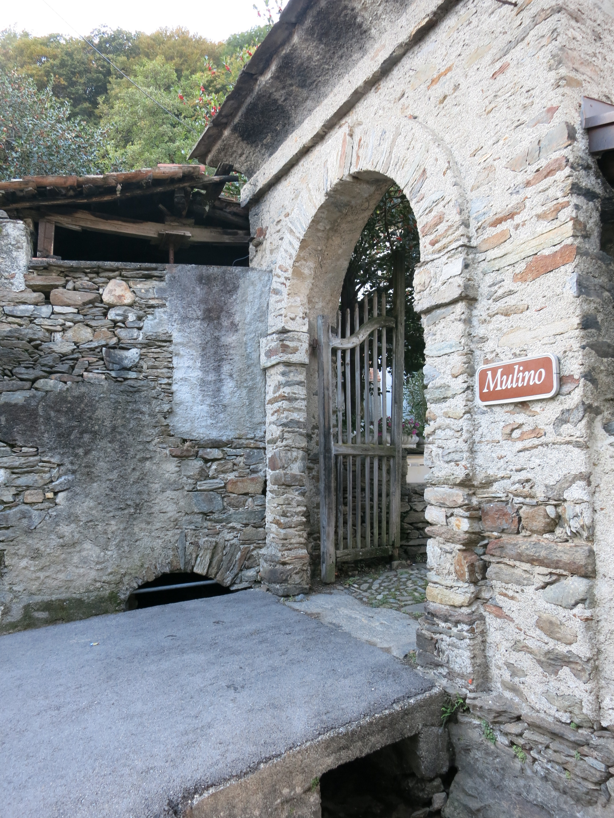 Soresina, Rivera TI, Schweiz